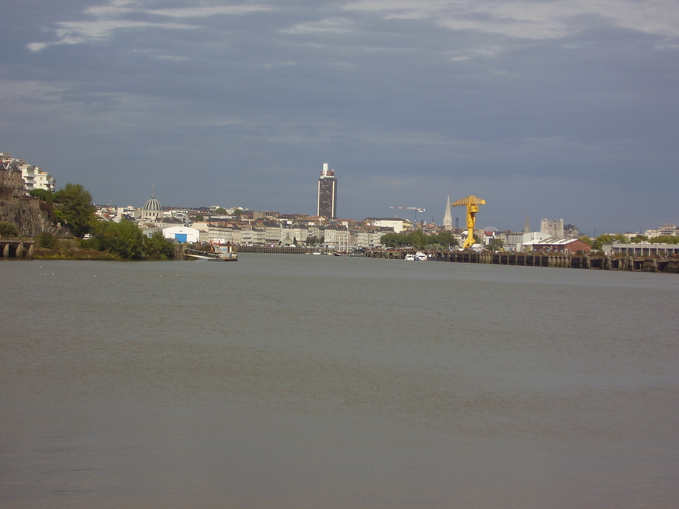 Vue de nantes